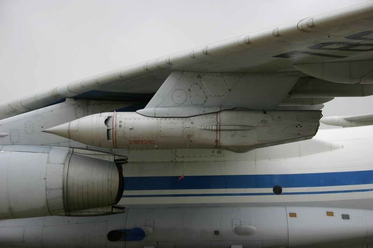 УПАЗ-1 под крылом Ил-78